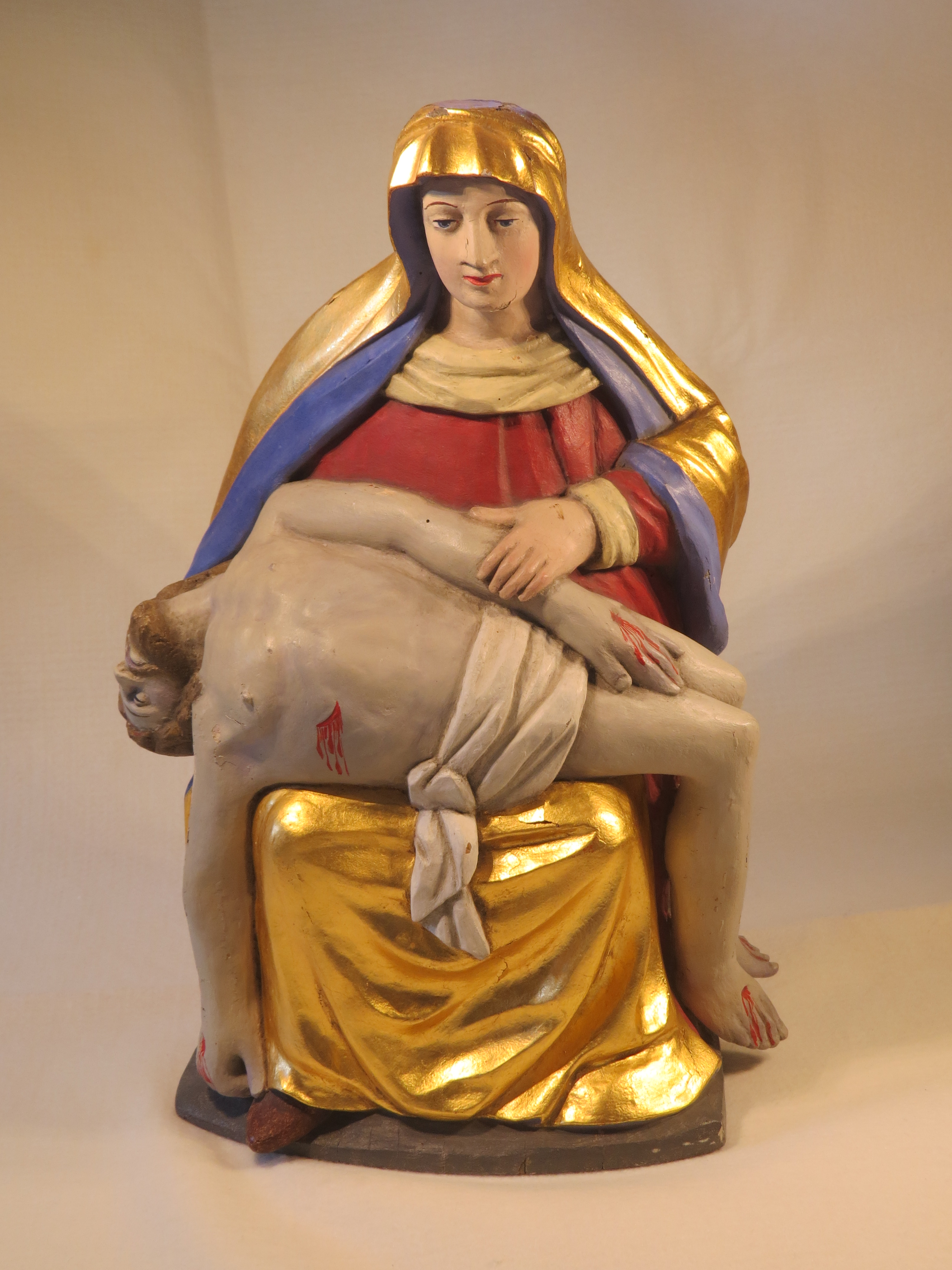 Gipsskulptur Johannes Evangelista steht im Kirchenraum der Filialkirche St. Markus Minkelfeld, Ortsteil von Kerben, Deutschland